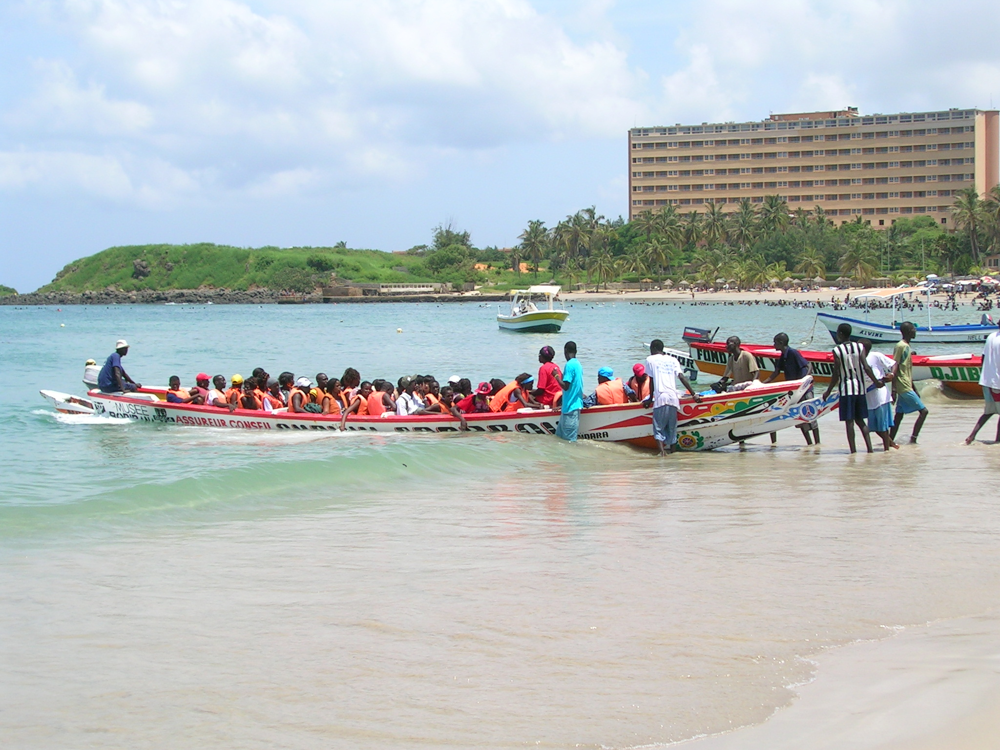 Départ d'une pirogue du village de Ngor presque de Cap Vert vers l'île de Ngor (Sénégal)